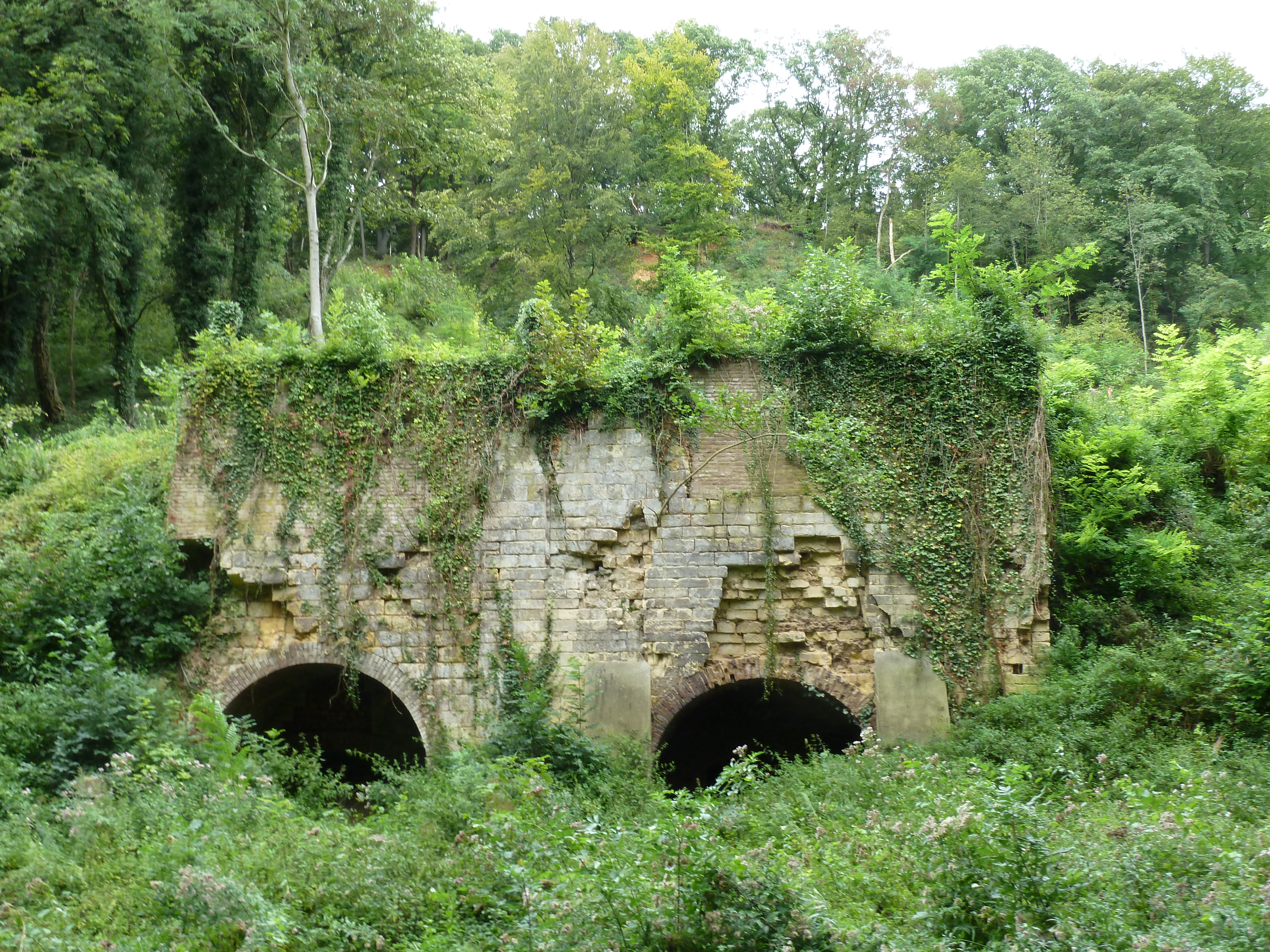 Kalkoven Biebosch, Sibbergrubbe, Sibbe, Valkenburg aan de Geul, Nederland